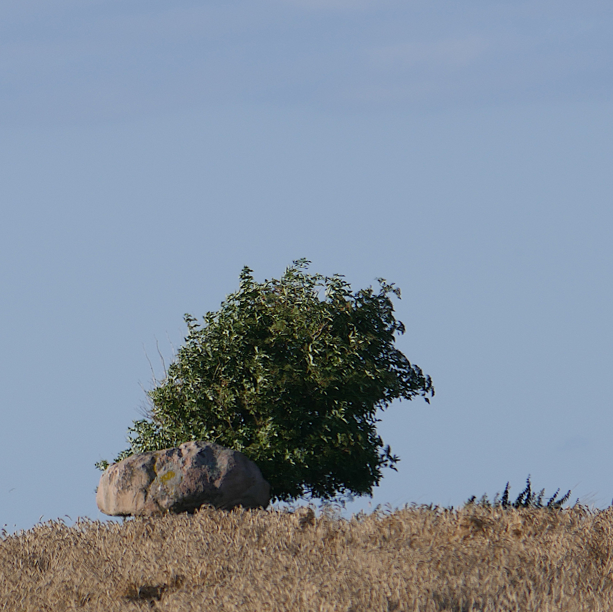 Megalithgrab 3 auf Helnaes. Der freistehende, West-Ost orientierte Dolmen hat eine ausgegrabene Kammer, bestehend aus zwei 0,70 – 0,85 m breiten und etwa 1,4 m und 1,0 m langen Steinen auf der Südseite. Der einzige Stein der Nordseite des Urdolmens ist 1,9 m lang. Die Kammer ist im Westen und Osten offen. Der Deckstein liegt auf. Foto von der Straße aus, da er im Juli 2020 unzugänglich im Kornfeld lag.